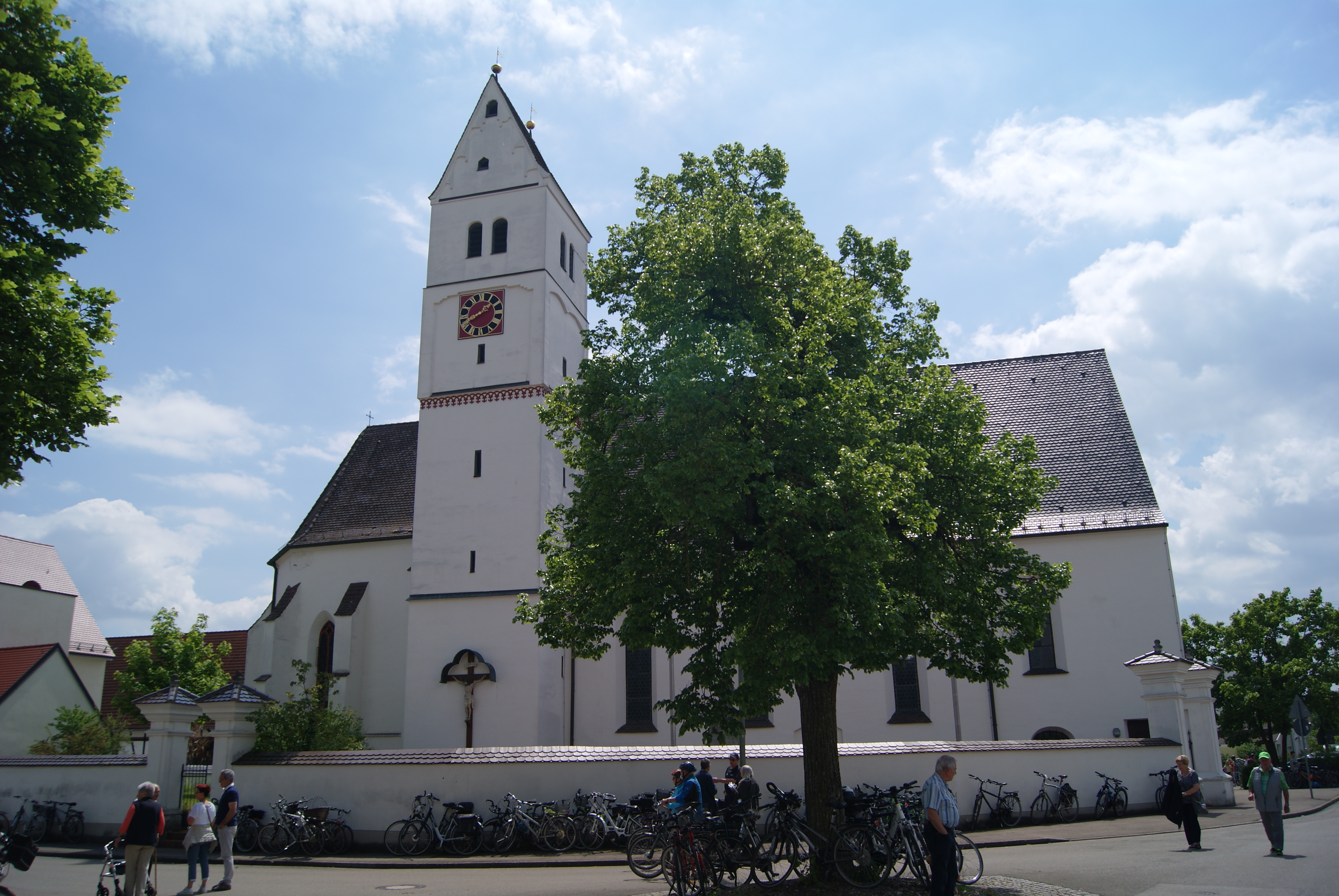 Kath. Pfarrkirche St. Peter und Paul; Saalbau mit eingezogenem Polygonalchor und Turm im nördlichen Winkel, von Hans Hägelin, frühes 16. Jahrhundert, im Chor bezeichnet 1519, südliches Seitenschiff und Erweiterung nach Westen 1980 ff.; mit Ausstattung